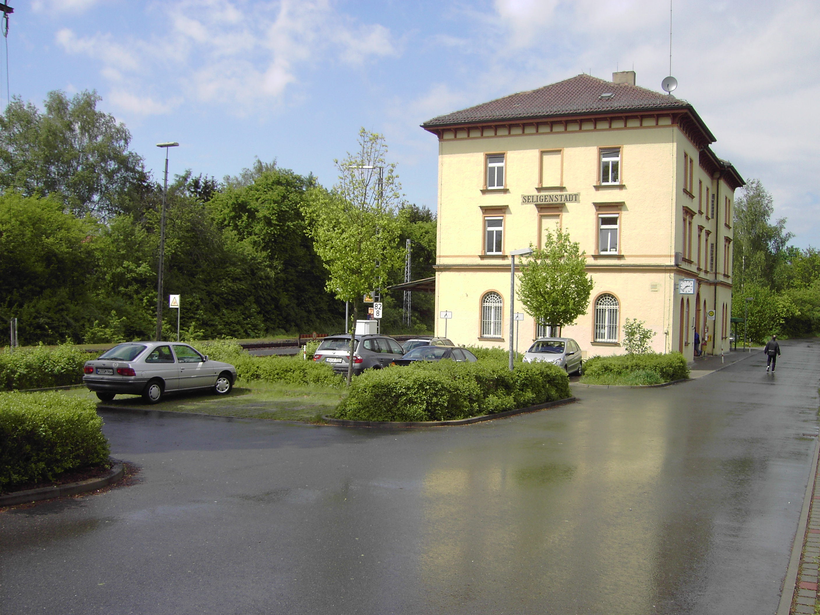 Das imposante Bahnhofsgebäude von Seligenstadt (bei Würzburg), im Vordergrund die vor einigen Jahren gebaute Park&Ride-Anlage. Links befindet sich die Bahnstrecke Würzburg–Bamberg (KBS 810). Der Bahnhof Seligenstadt verfügt jedoch nur über einen Bahnsteig am Gleis 1 Richtung Schweinfurt, weshalb die Züge Richtung Würzburg vor und nach dem Bahnhof das Gleis wechseln müssen. Einige hundert Meter nördlich befindet sich der Haltepunkt Seligenstadt (Mainschleifenbahn), wo sonn- und feiertags die Schienenbusse ins 10 Kilometer entfernte Volkach am Main abfahren.